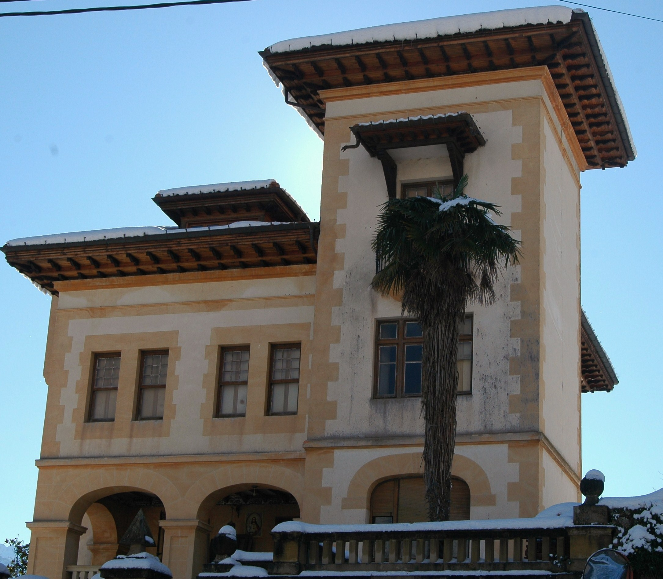 Villa Mier, casona d'indianos n'Alles.